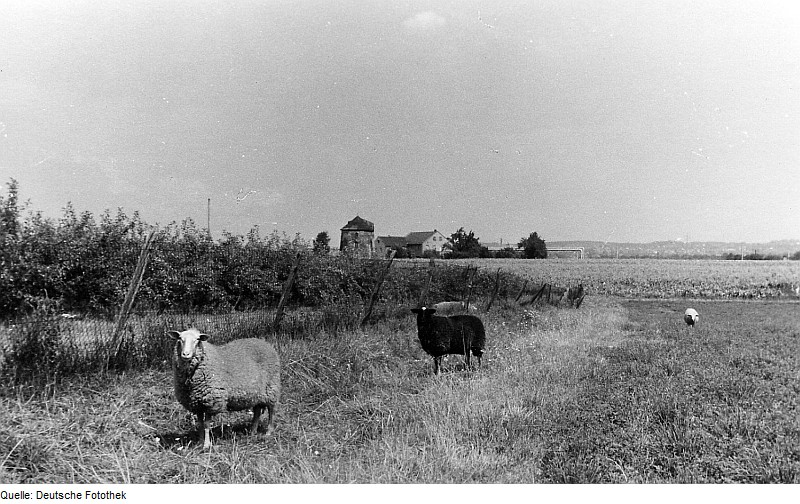 Original image description from the Deutsche FotothekCoswig-Brockwitz. Windmühlengehöft